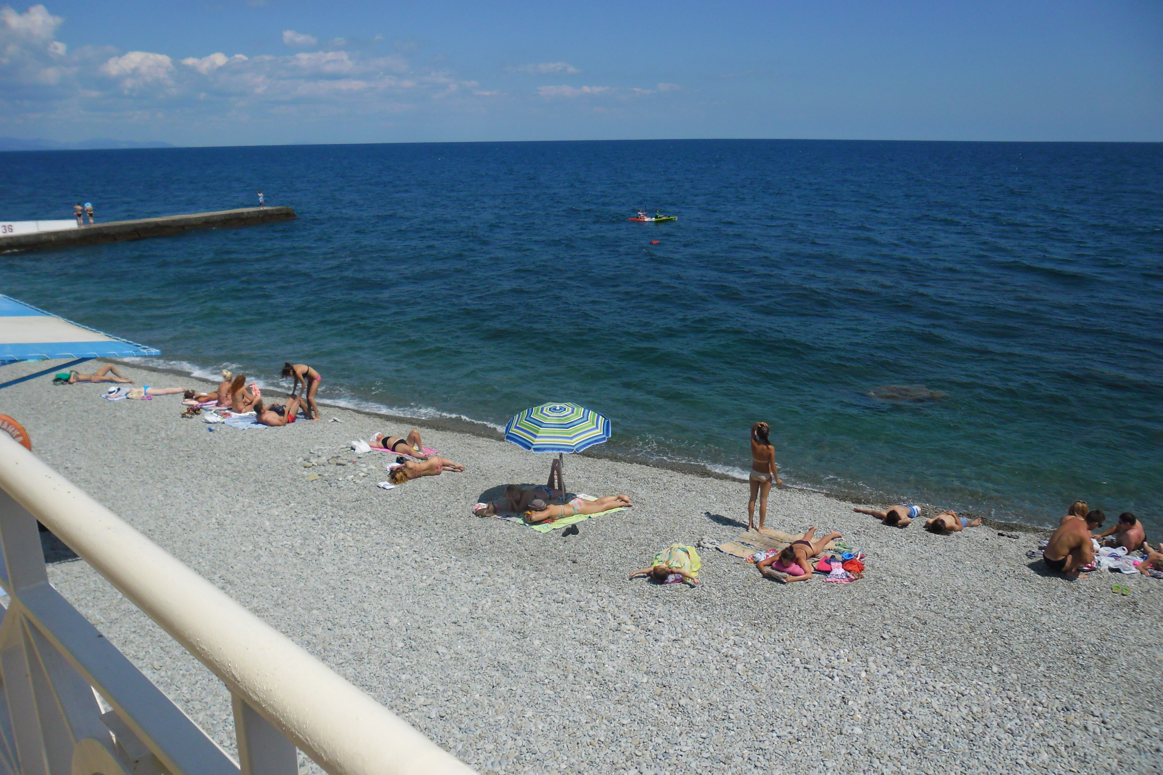 Фото